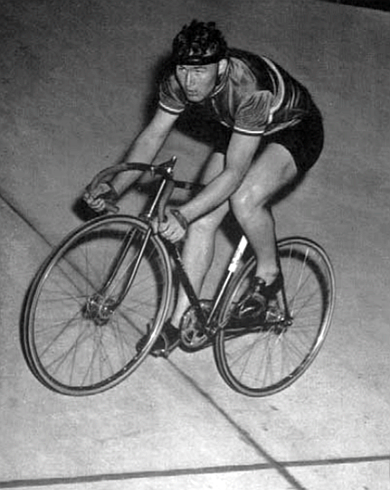 Finale de poursuite cycliste individuelle aux JO de Melbourne, 1er Michel Rousseau (Fr) .